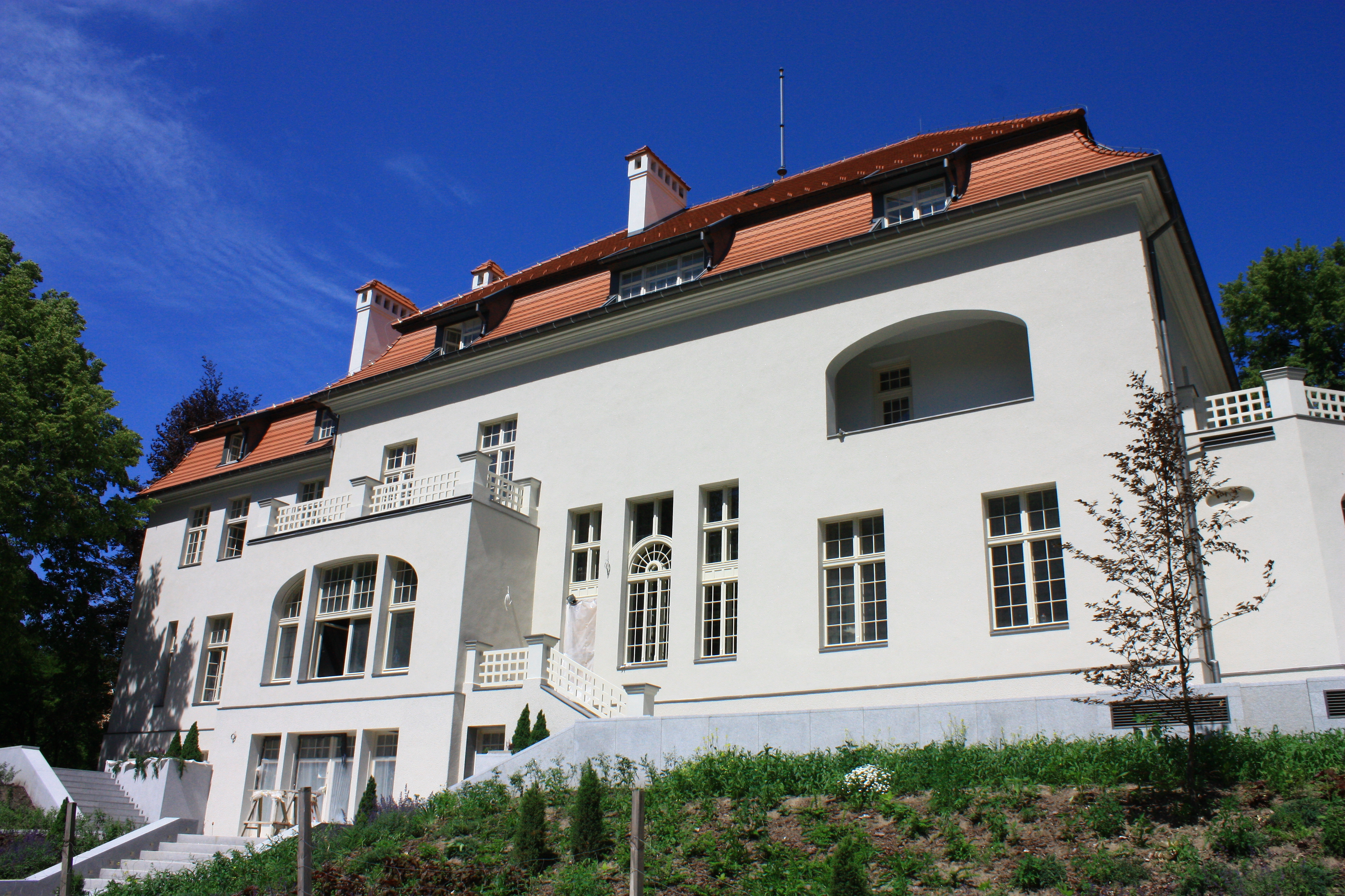 Olsztyn, ul. Zamkowa 5, dom, 2 poł. XIX